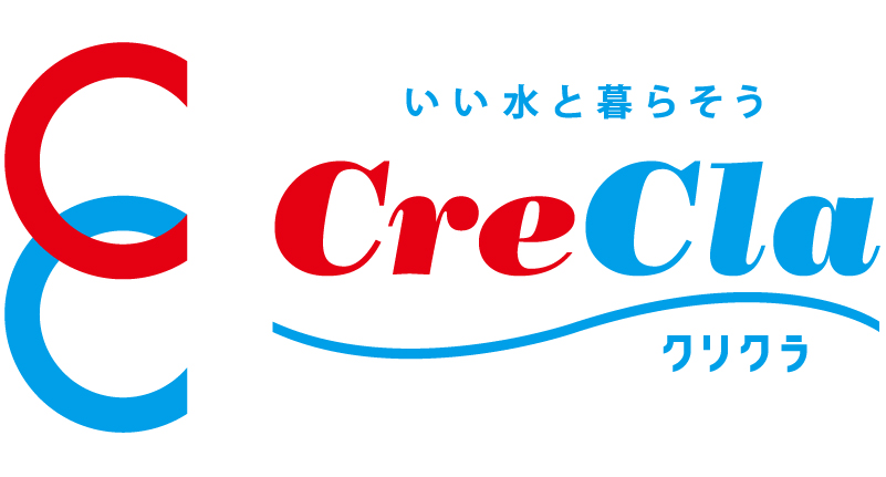 クリクラロゴ